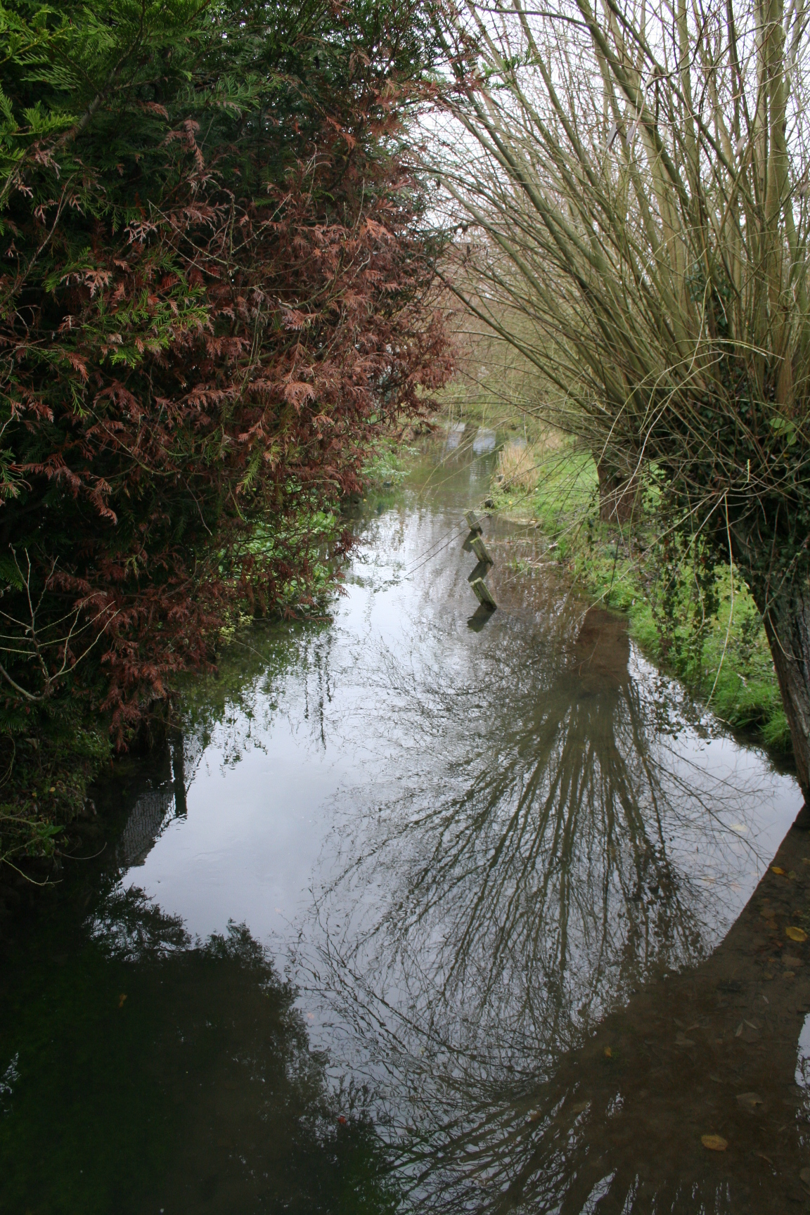 le petit thérain à Roy-Boissy (rue des Larries) - Oise - Picardie Picard: ch' tiot Thérin à Roé-Boéssy (rue des Larries) - Oése - Picardie